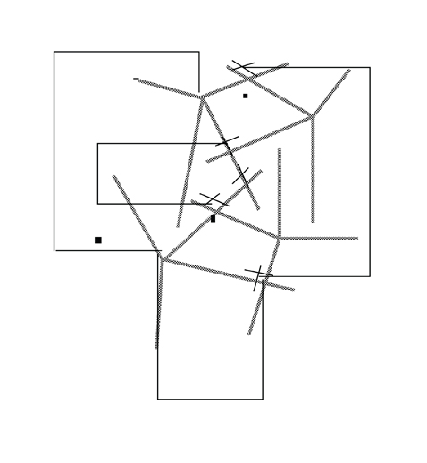 Dessin